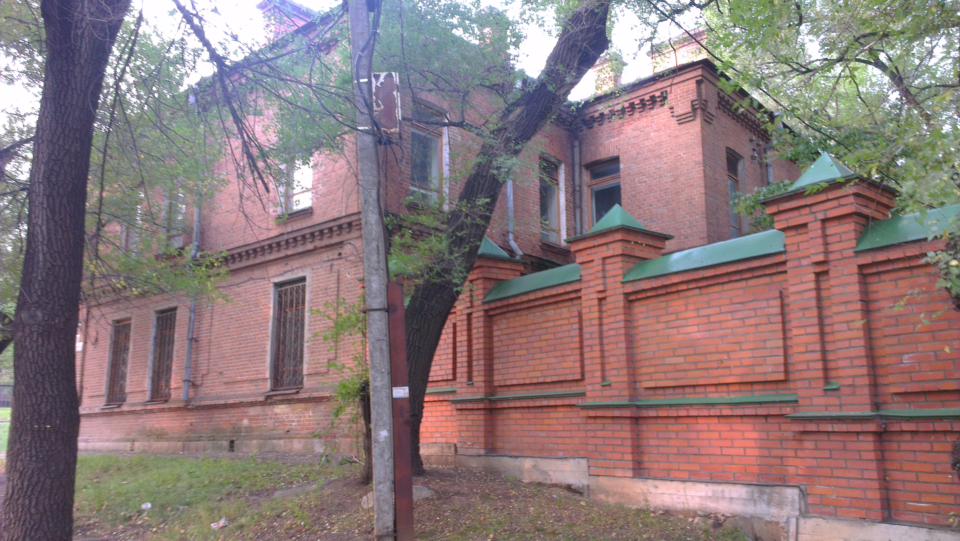 Комплекс зданий Кадетского корпуса. Дом жилой воспитателей (Хабаровский край, Хабаровск, Серышева улица, 28)